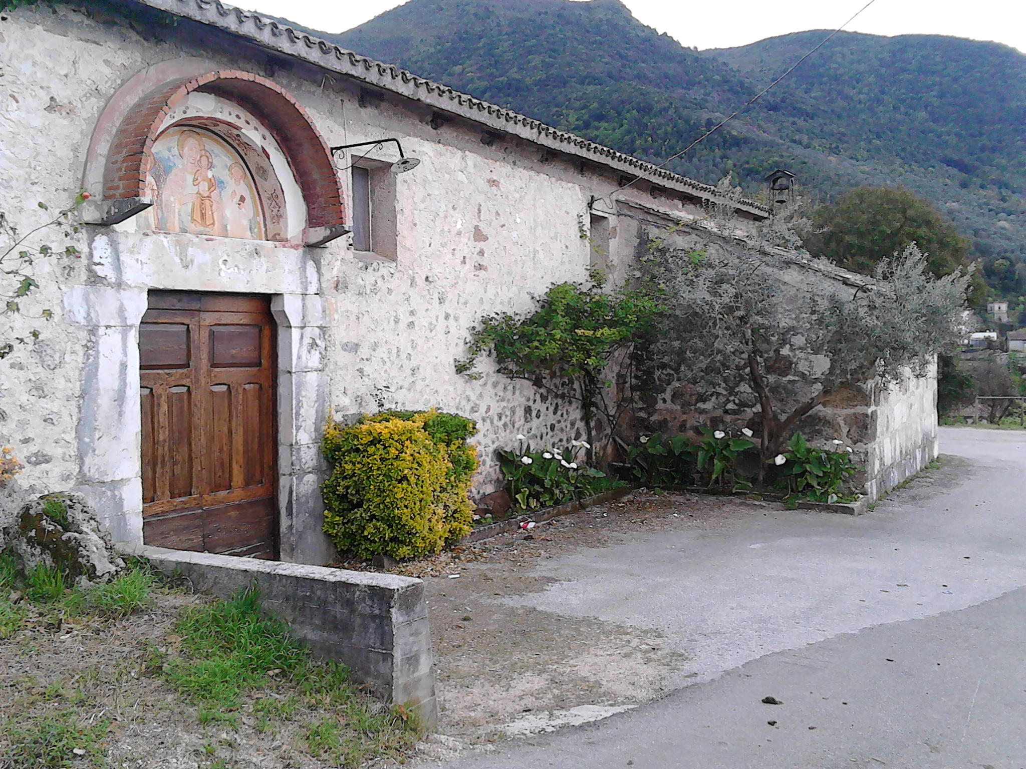 Chiesa di Santa Maria Maggiore a Sant'Elia Fiumerapido